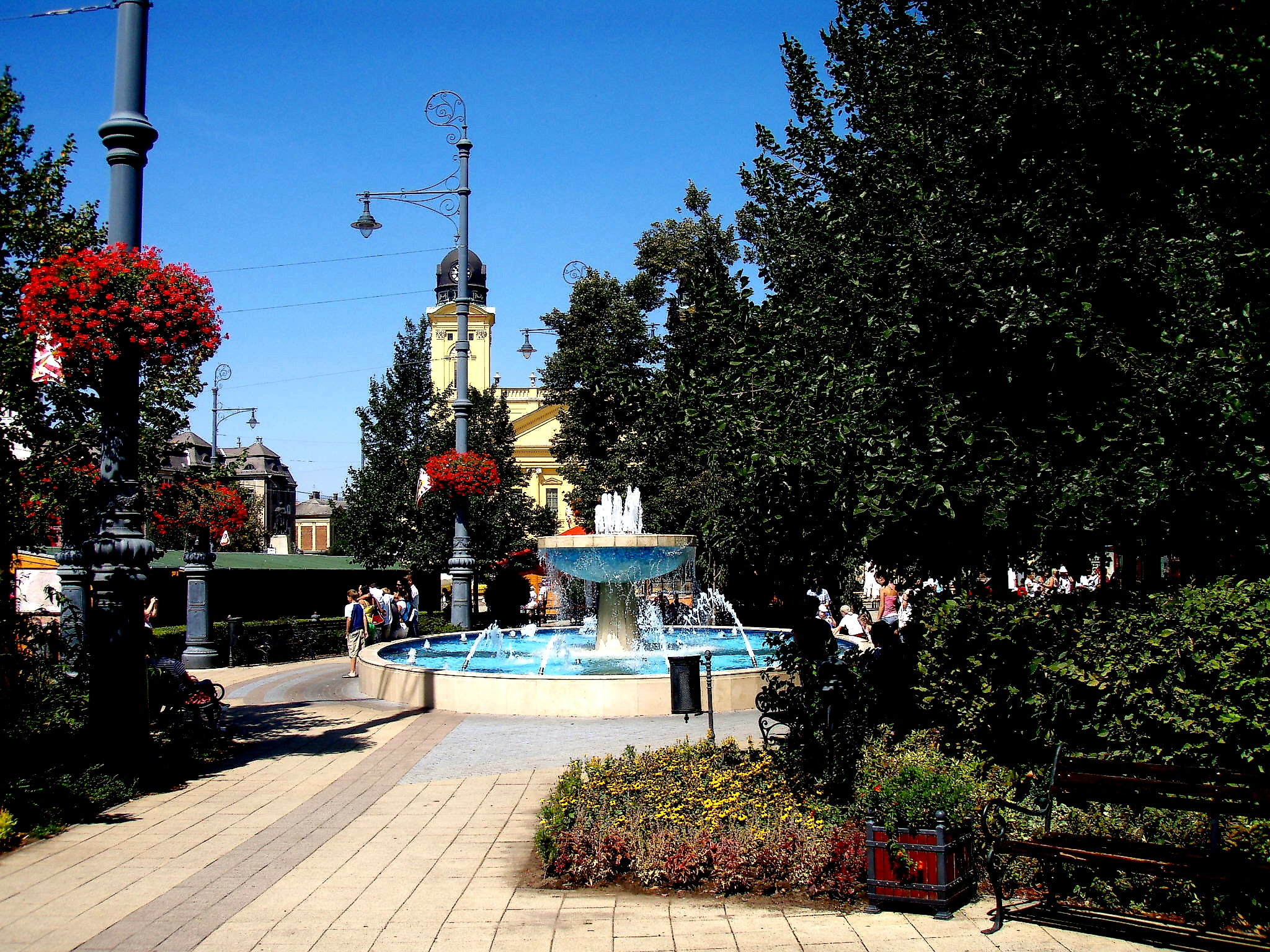 Debrecen főtere szökőkúttal